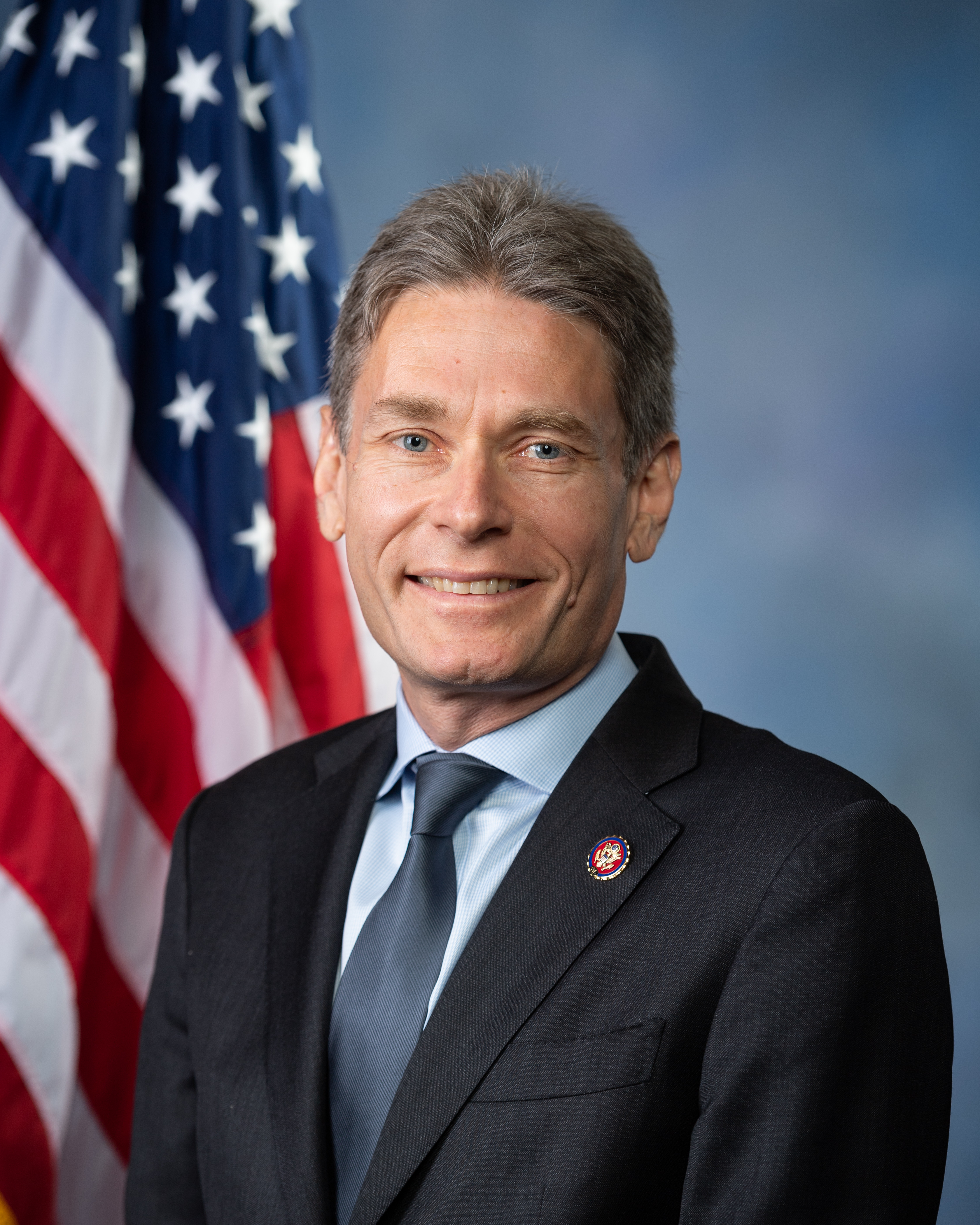 US Rep. Tom Malinowski (NJ)